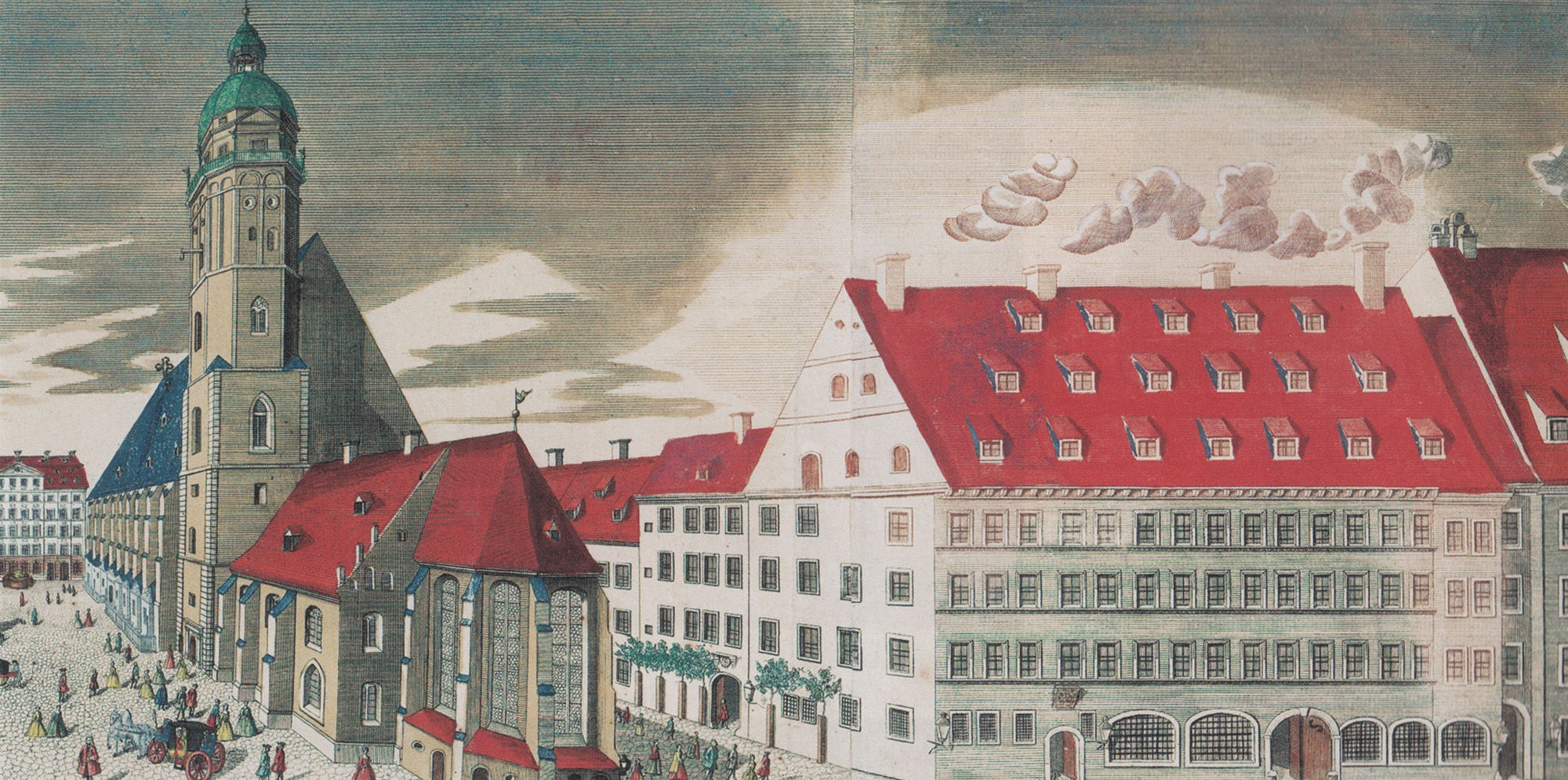 Das Amtshaus in Leipzig und die Thomaskirche 1749